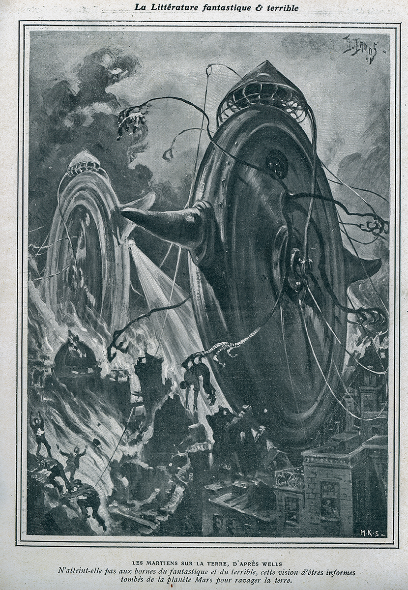 Illustration de l'oeuvre de HG Wells - la guerre des mondes